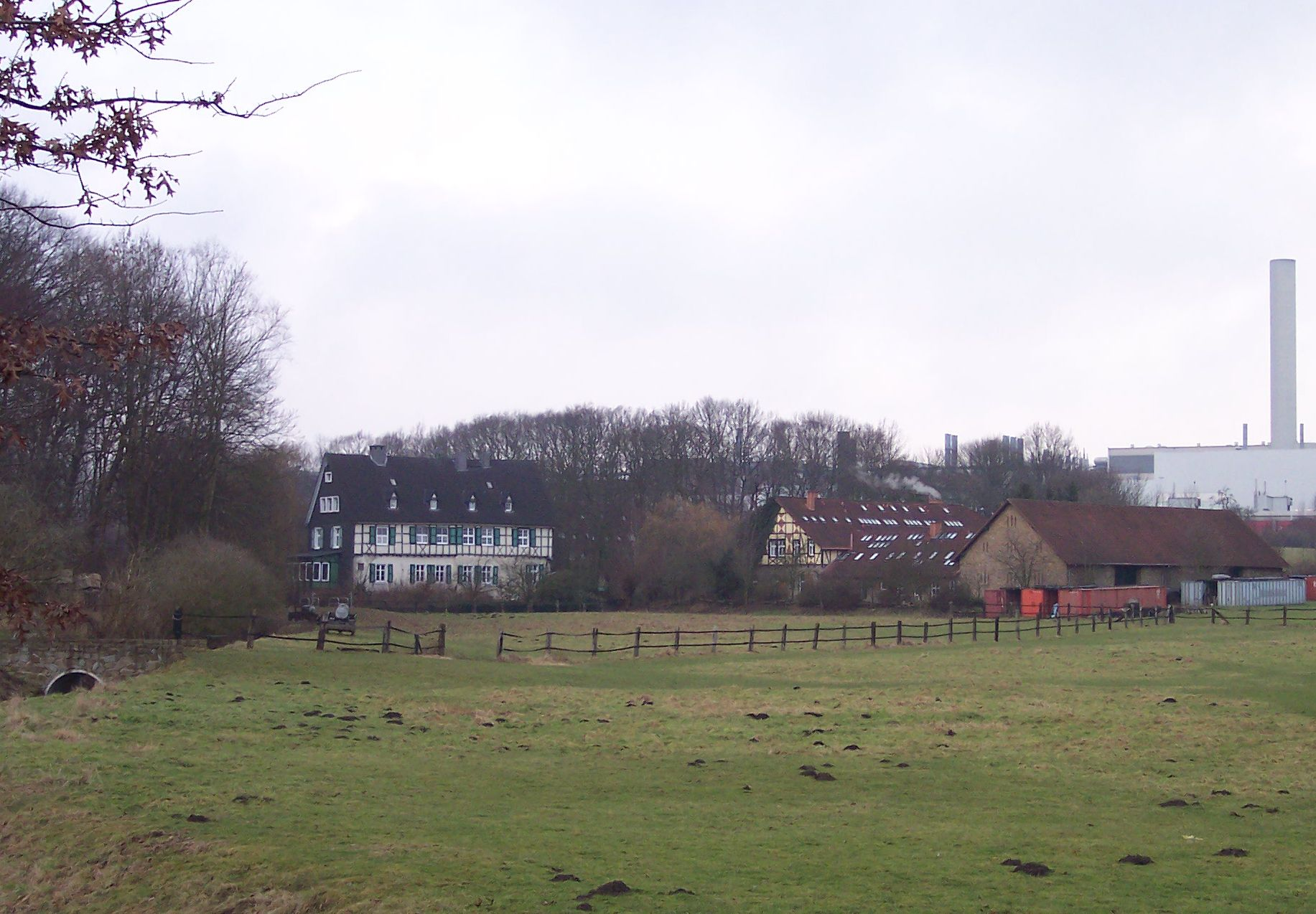 Haus Laer in Bochum